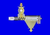 Wirbelstromsiebmaschine der AZO GmbH + Co. KG